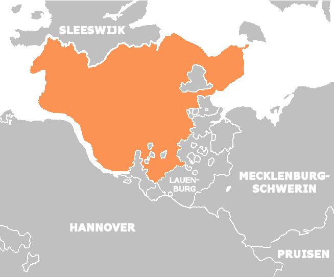 Holstein in 1848